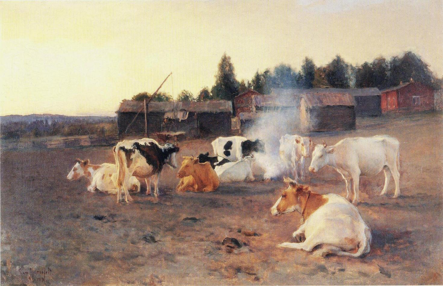 Eero Järnefeltin maalaus Lehmisavu. Kuuluu yksityiskokoelmaan.